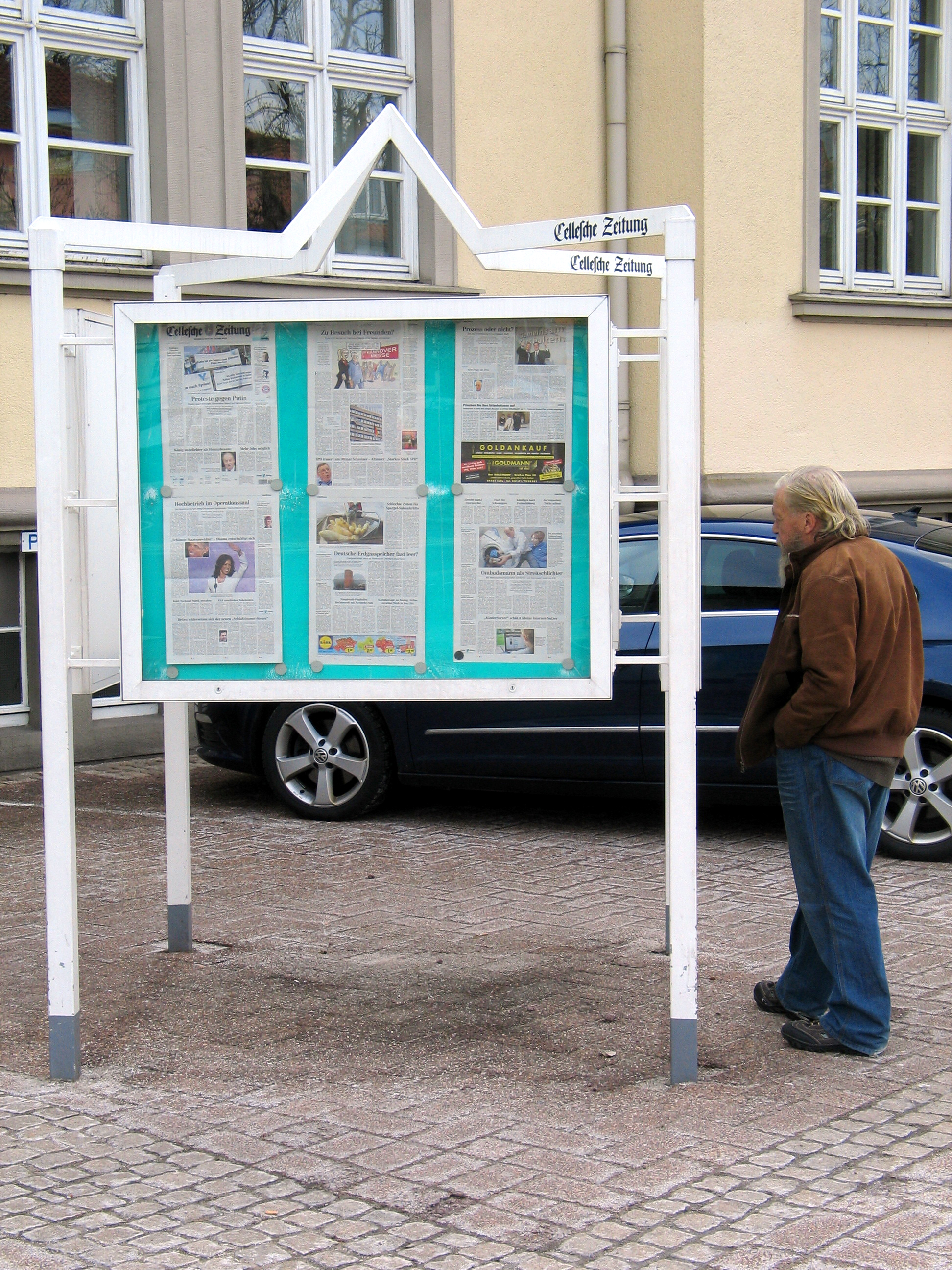 Einzelne Seiten der Celleschen Zeitung im Informationsstand vor dem Hauptgebäude in Celle werden von Passanten offensichtlich gelesen ...